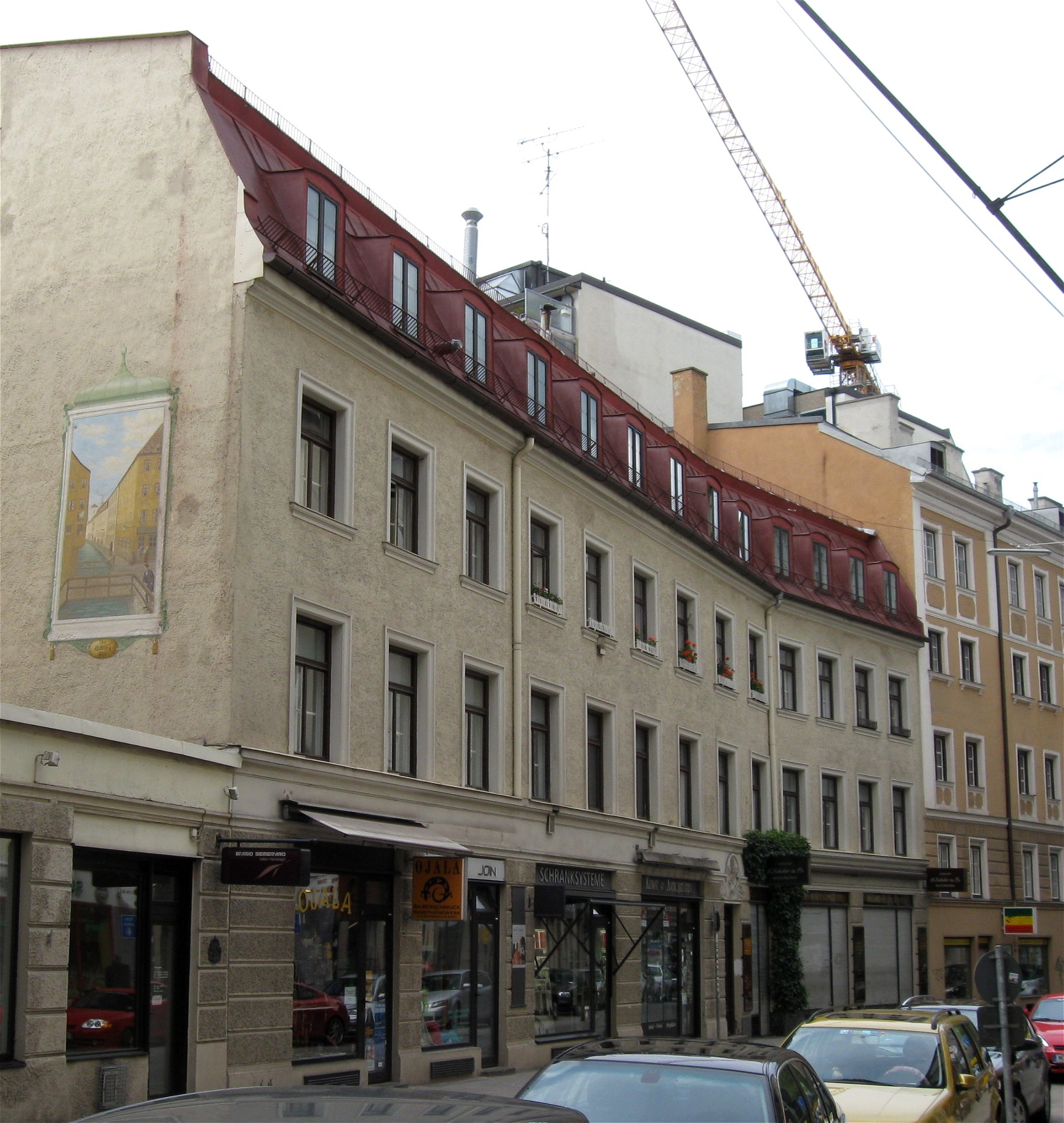 Radlsteg 2; Ehem. Radlbad (seit dem 14. Jh.), dreigeschossiges, langgestrecktes altes Bürgerhaus, umgebaut 1878 (Mansarddach) und 1897 (Erdgeschoss mit Schaufenstern)